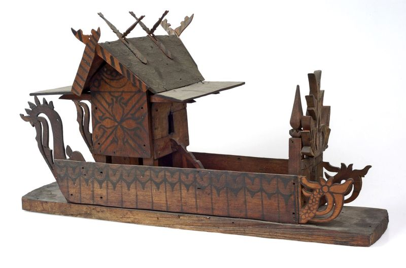 Huismodel. Lichamen werden vaak jaren lang opgenomen in een dodenhuis buiten de nederzetting. Na een tijd, als er genoeg geld is verzameld voor het vieren van het grote dodenfeest, tiwah, waarbij zielen geacht werden naar het zielenland te vertrekken m.b.v. priesterlijke bemiddeling, worden de beenderen van de overledene in een doek gewikkeld en opgenomen in een knekelhuisje of een grote aardewerken pot, beide op een paal geplaatst.. Model van een geestenhuisje of zielenschip Unknown language: Sandung tulang